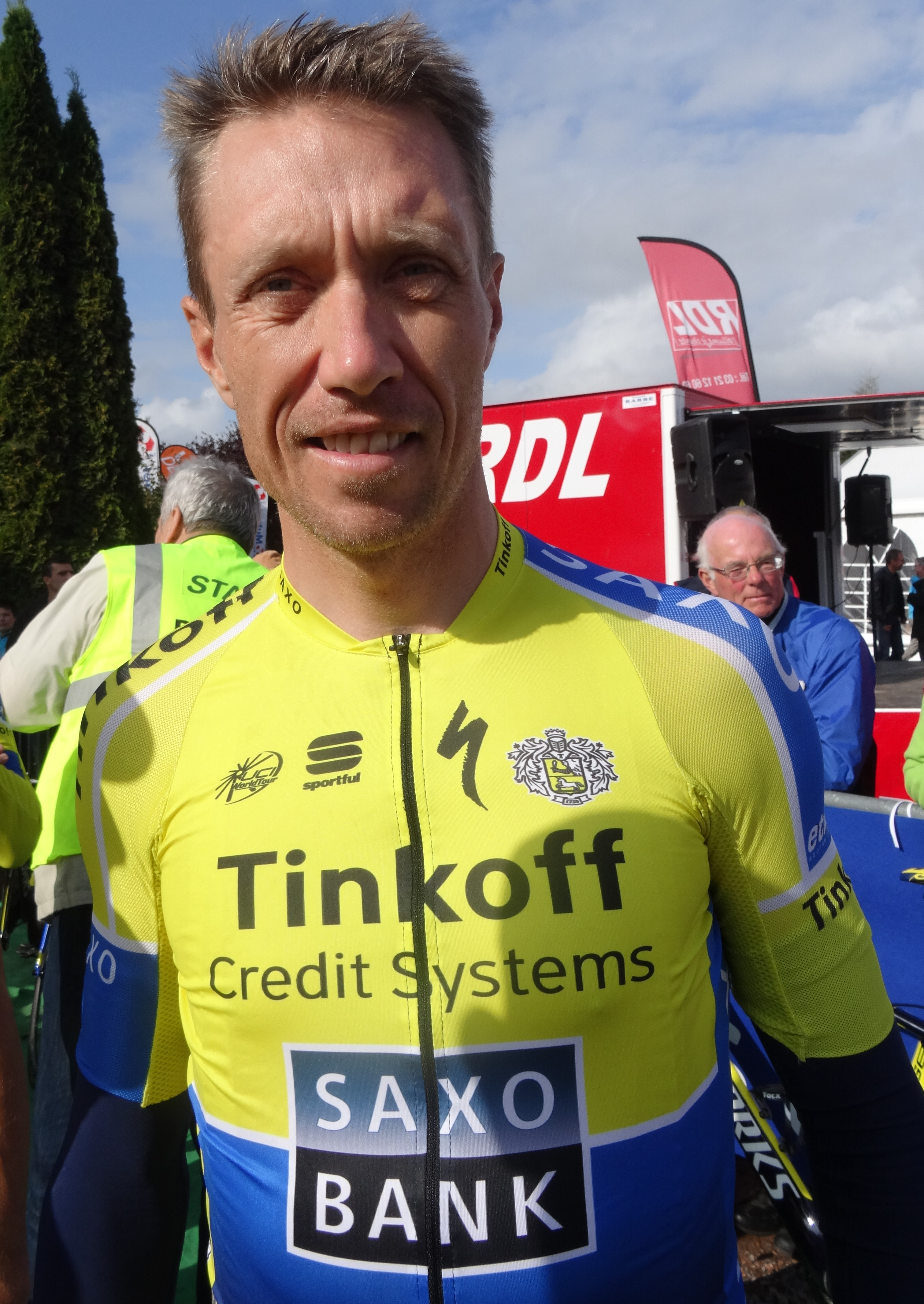 Reportage réalisé le dimanche 21 septembre à l'occasion du départ et de l'arrivée du Grand Prix d'Isbergues 2014 à Isbergues, Nord-Pas-de-Calais, France.